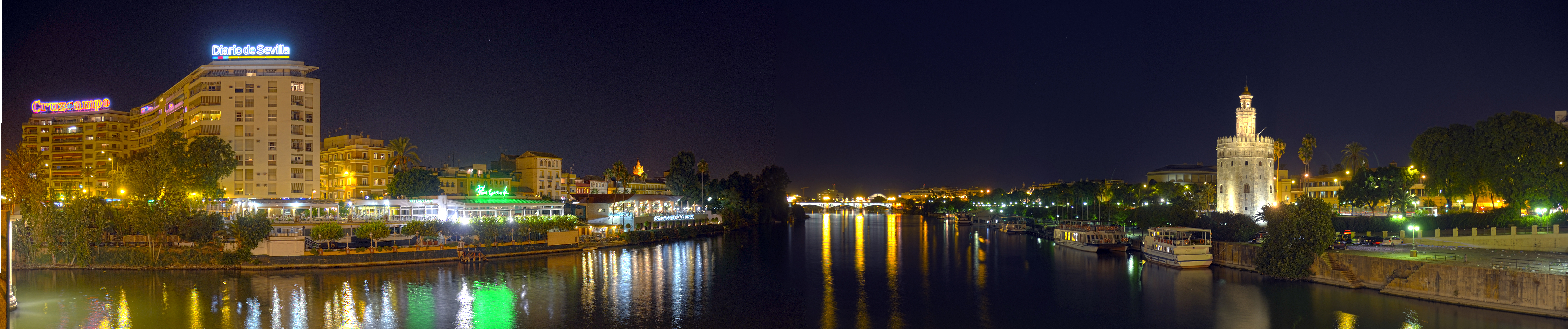 Panorámica del rio Guadalquivir en Sevilla, Spain